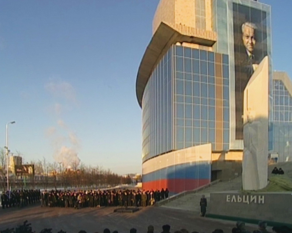 Кадр из видеозаписи церемонии открытия памятника Ельцину в Екатеринбурге 1 февраля 2011 года. (